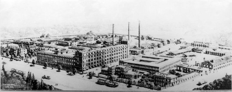 Az Egyesült Izzó látképe